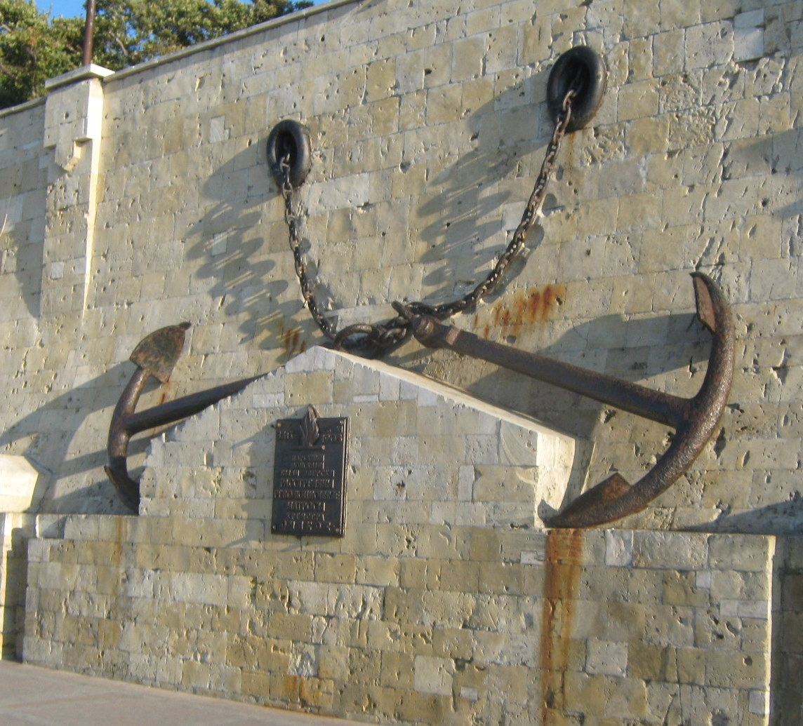 Пам'ятний знак на місці розстрілу Очаківців на Приморському бульварі у Севастополі